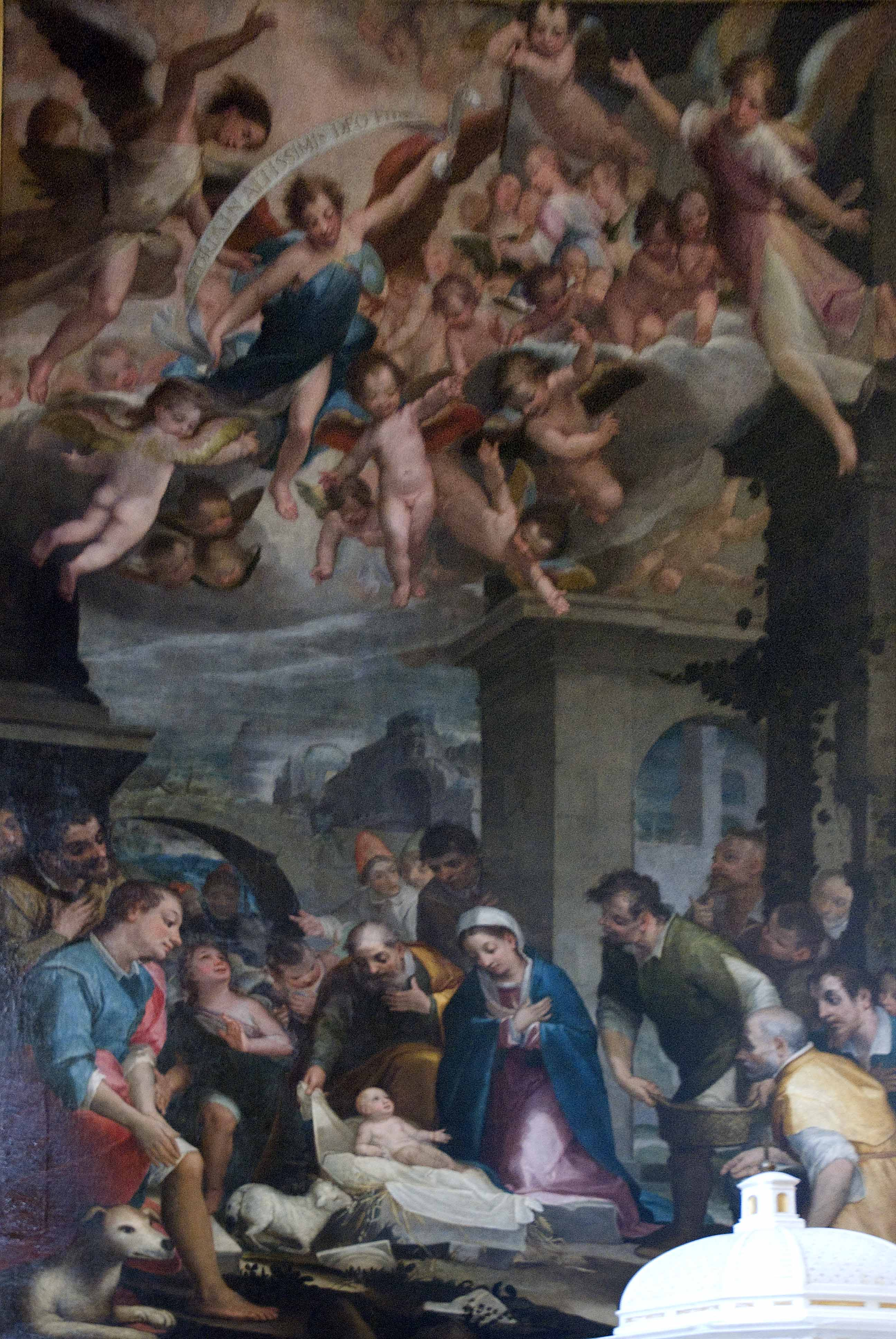 Natività di Nostro Signore e Adorazione dei pastori, olio su tela di Alessandro Casolani, collegiata di Radicondoli